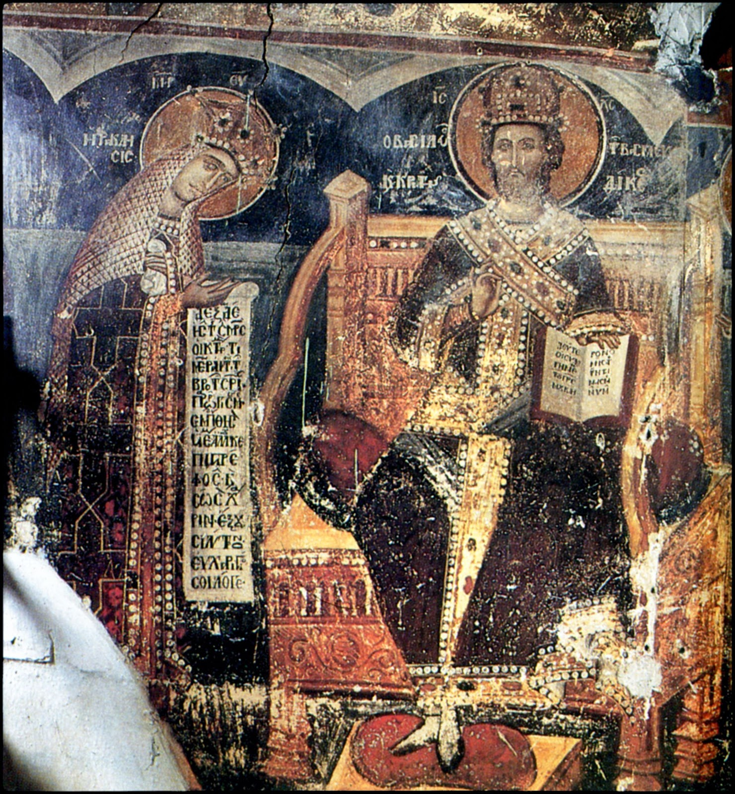 Καστοριά. Άγιος Αθανάσιος του Μουζάκη. Η Θεοτόκος και ο Χριστός από τη Δέηση. 1383-1384